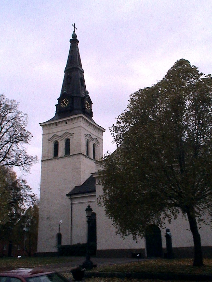 Diocese of Karlstad